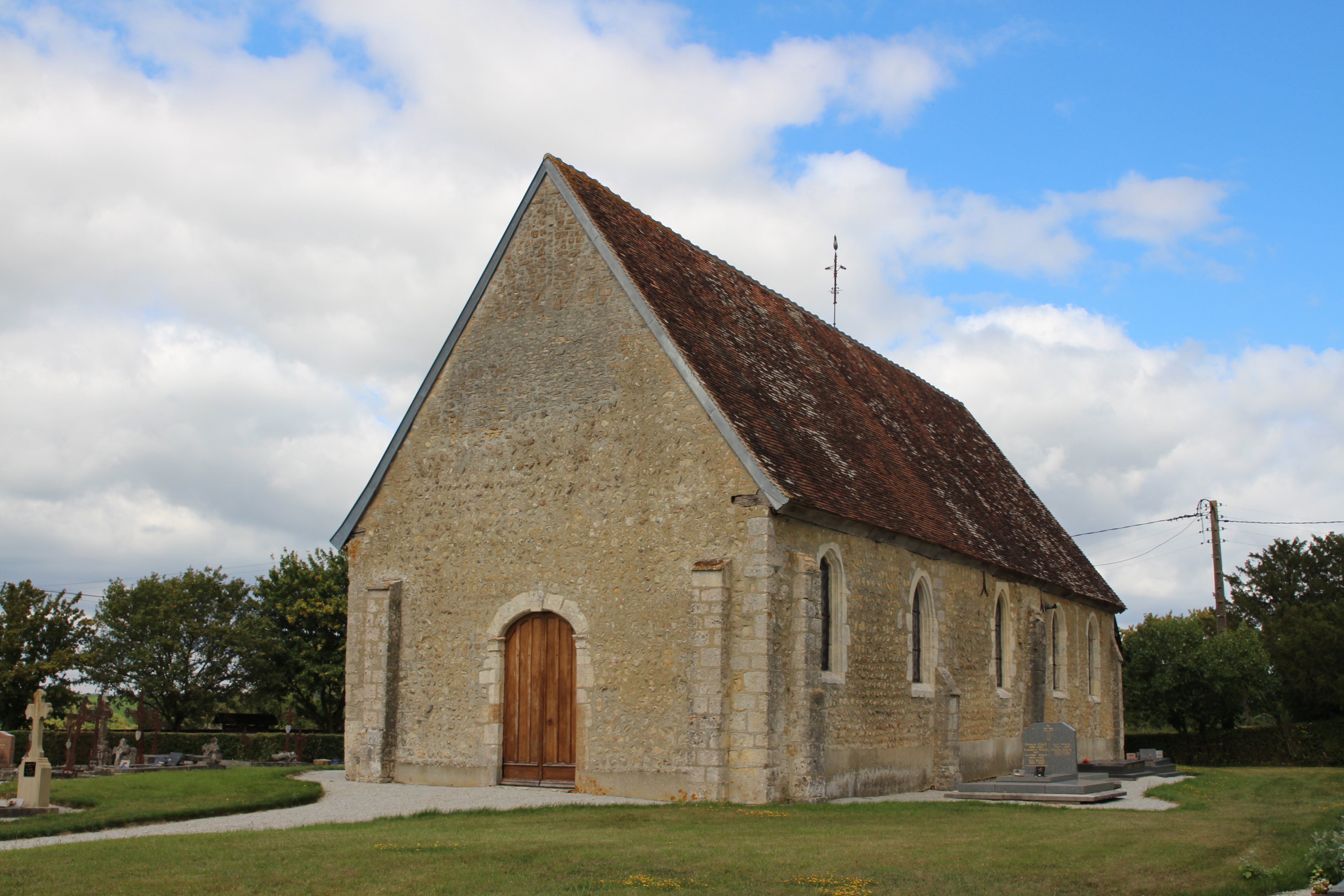 Saint-Léonard-des-Parcs, Orne